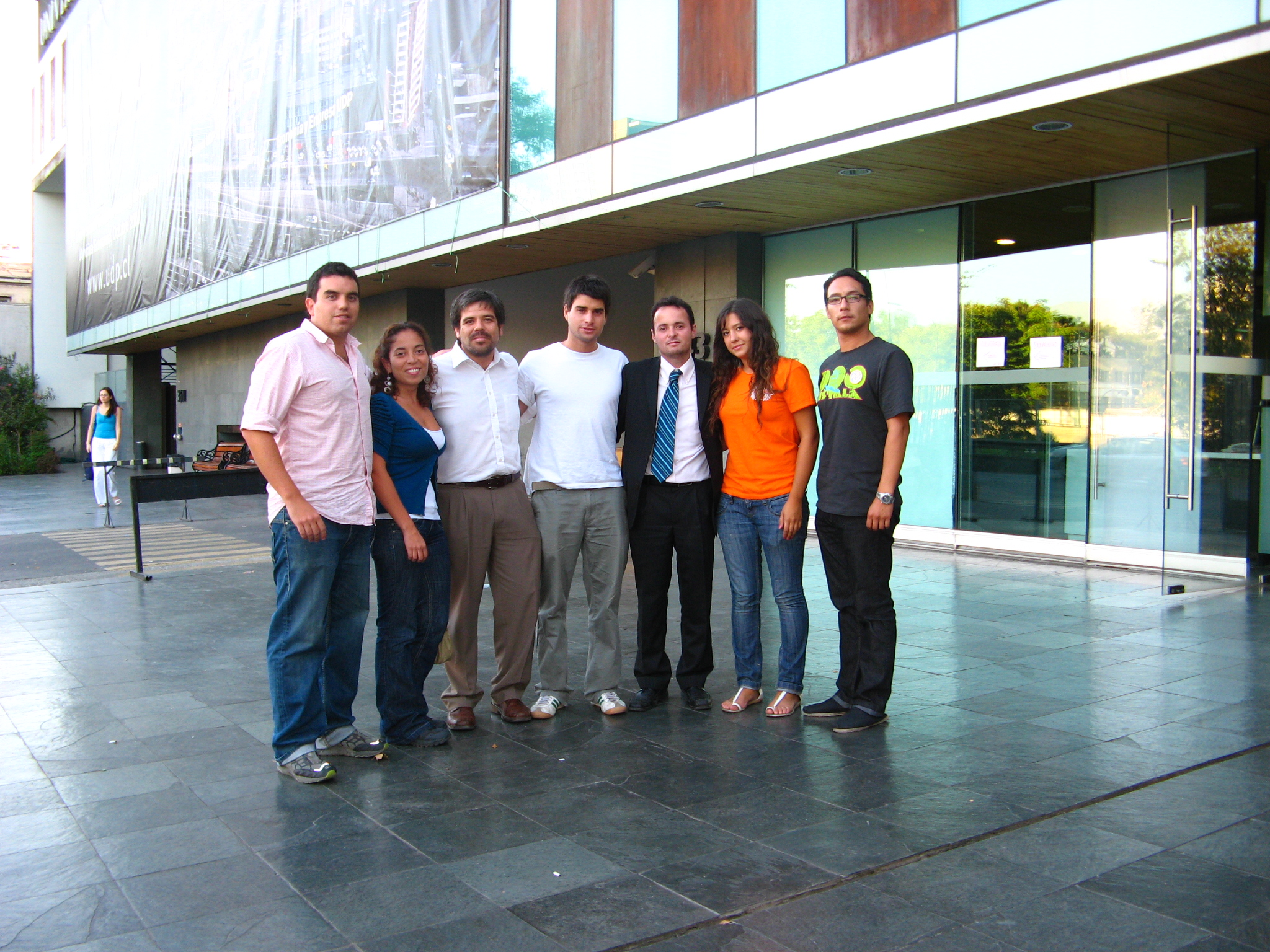 De izq a der : Raul Morales, Coordinador General 2003; Barbara Bravo, Secretaria General 1998 y 2000; Francisco Arrizaga, Presidente 1998 y 2000; Nicolás Gajardo, Vicepresidente 2010; Nicolás Pavez, Presidente 2003; Paula Figueroa, Secretaria General 2010; y Sebastián Llantén, Presidente 2006.